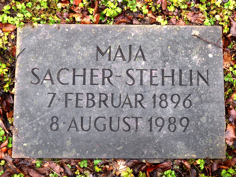 Maja Sacher-Stehlin (1896–1989) Bildhauerin, Mäzenin, Familiengrab auf dem Friedhof Hörnli, Riehen, Basel-Stadt